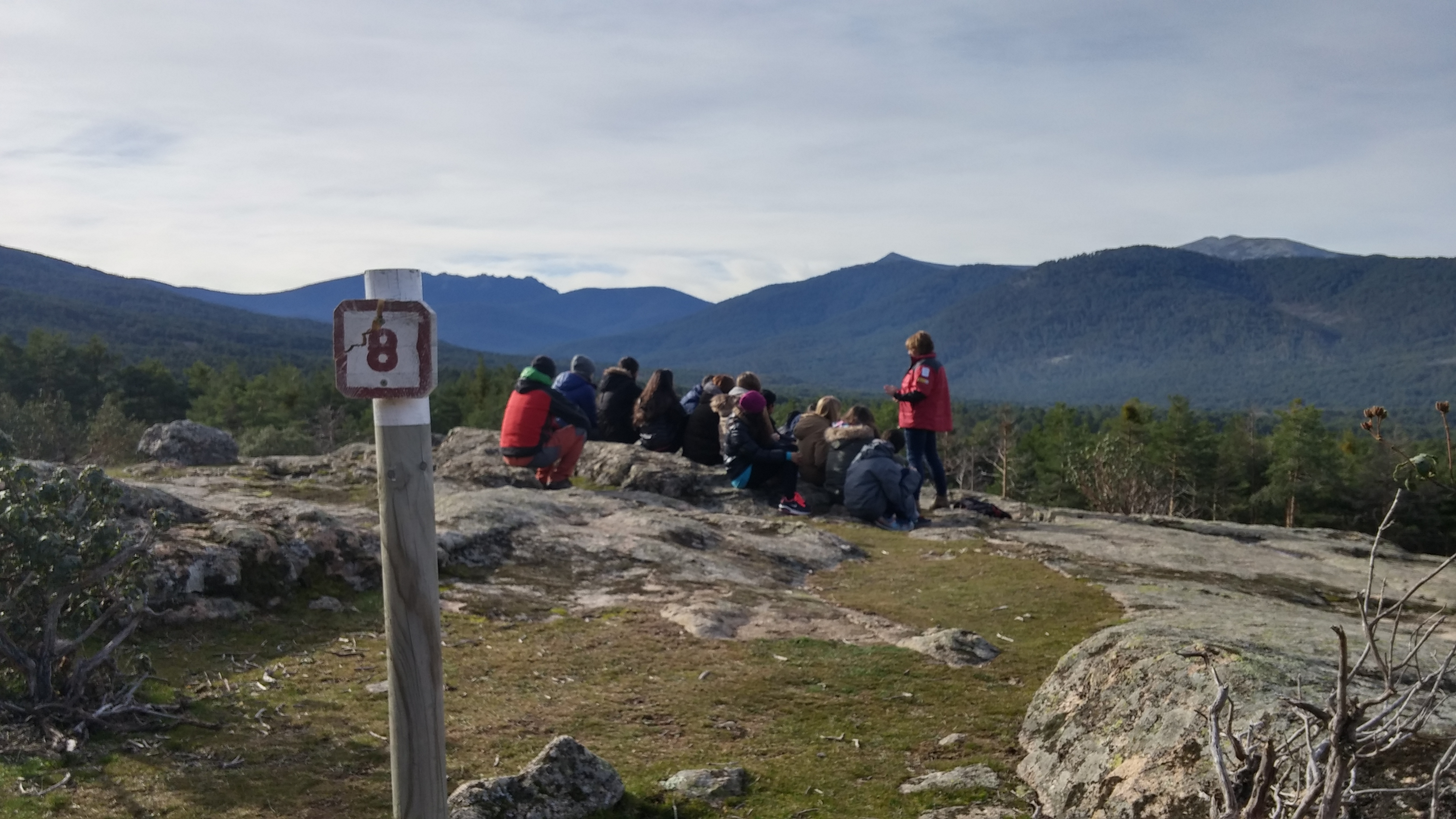 Programa educativo CENEAM